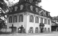 Stadtbücherei Heilbronn im Schießhaus